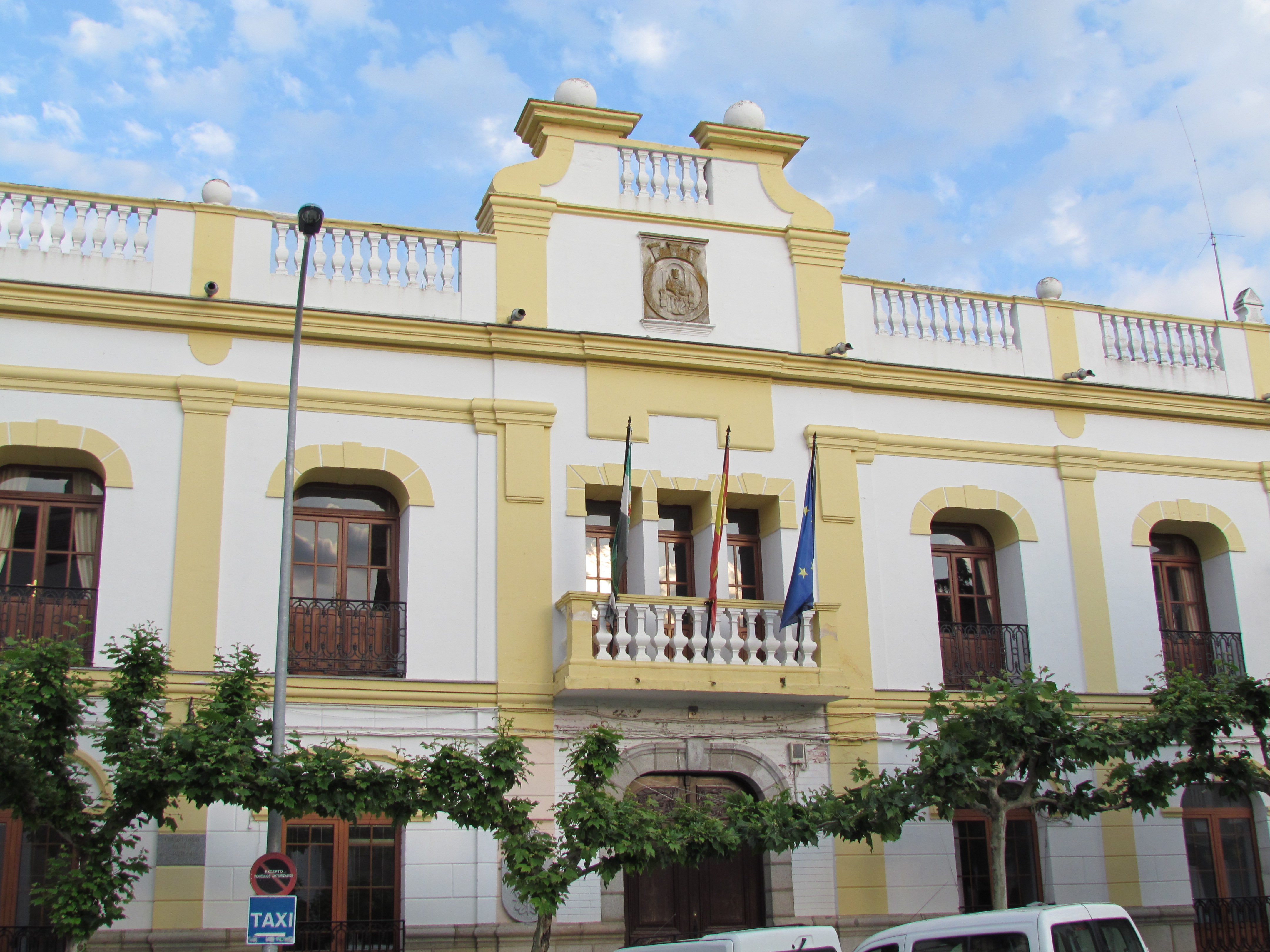 Ayuntamiento de Quintana de la Serena, situado en la Plaza de España.